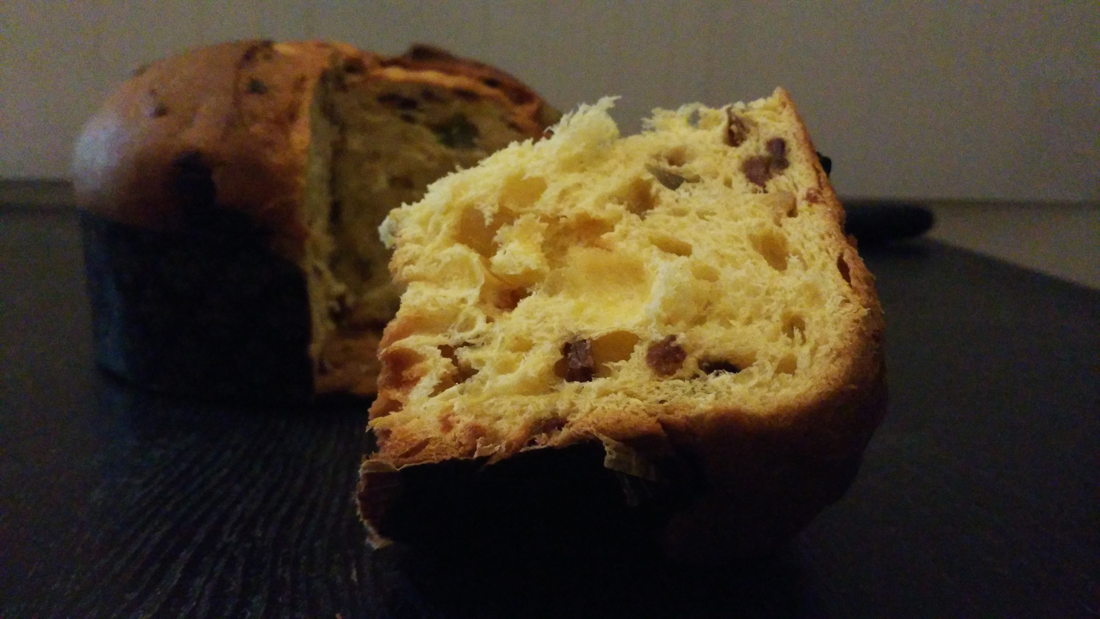 An Italian panettone.